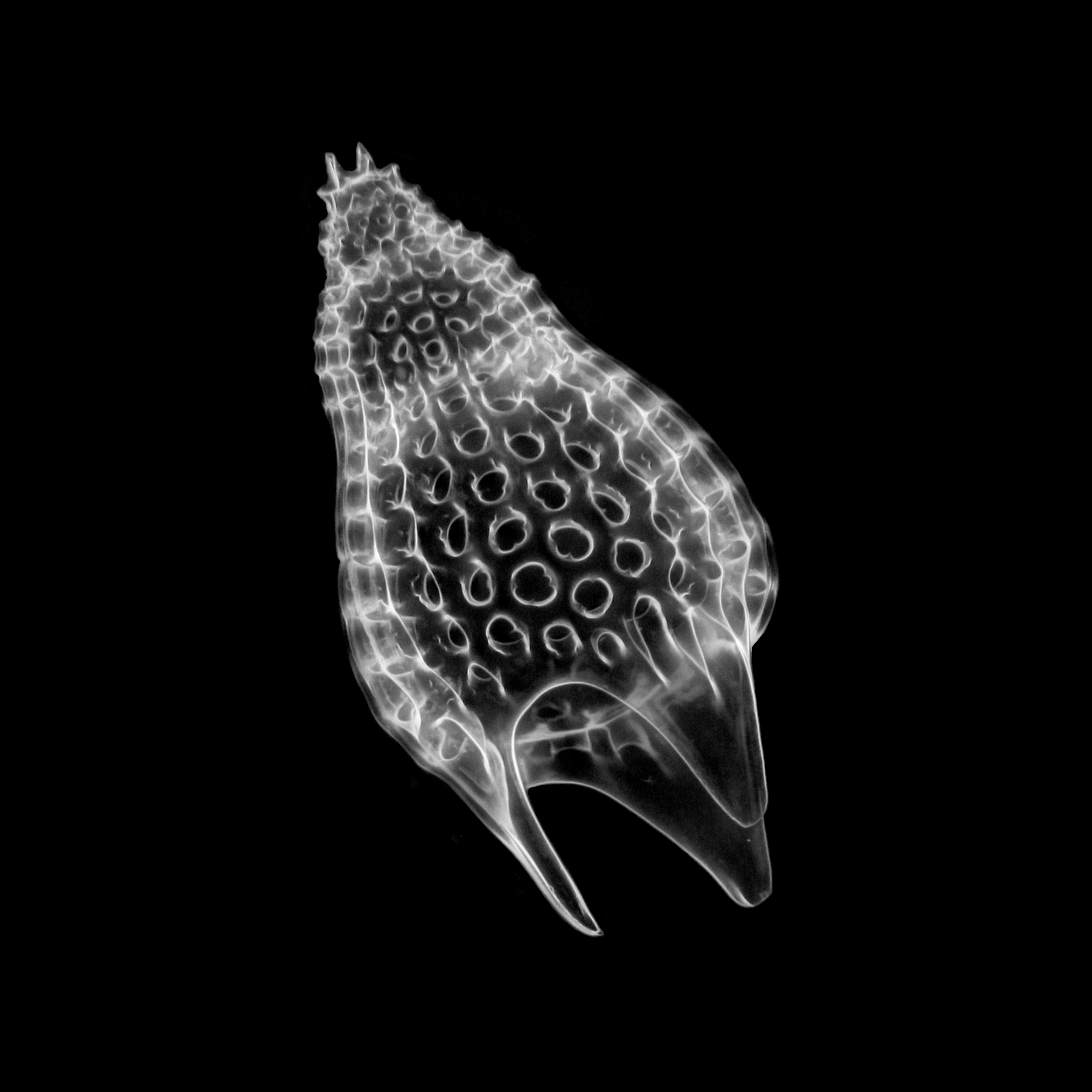 160x magnified, stacked image, bright field (negative image) Fundort / Site: Barbados (sediment sample) Alter / Age: fossil (Middle Eocene to Oligocene) Präparation / Preparation: Andreas Drews, 2015